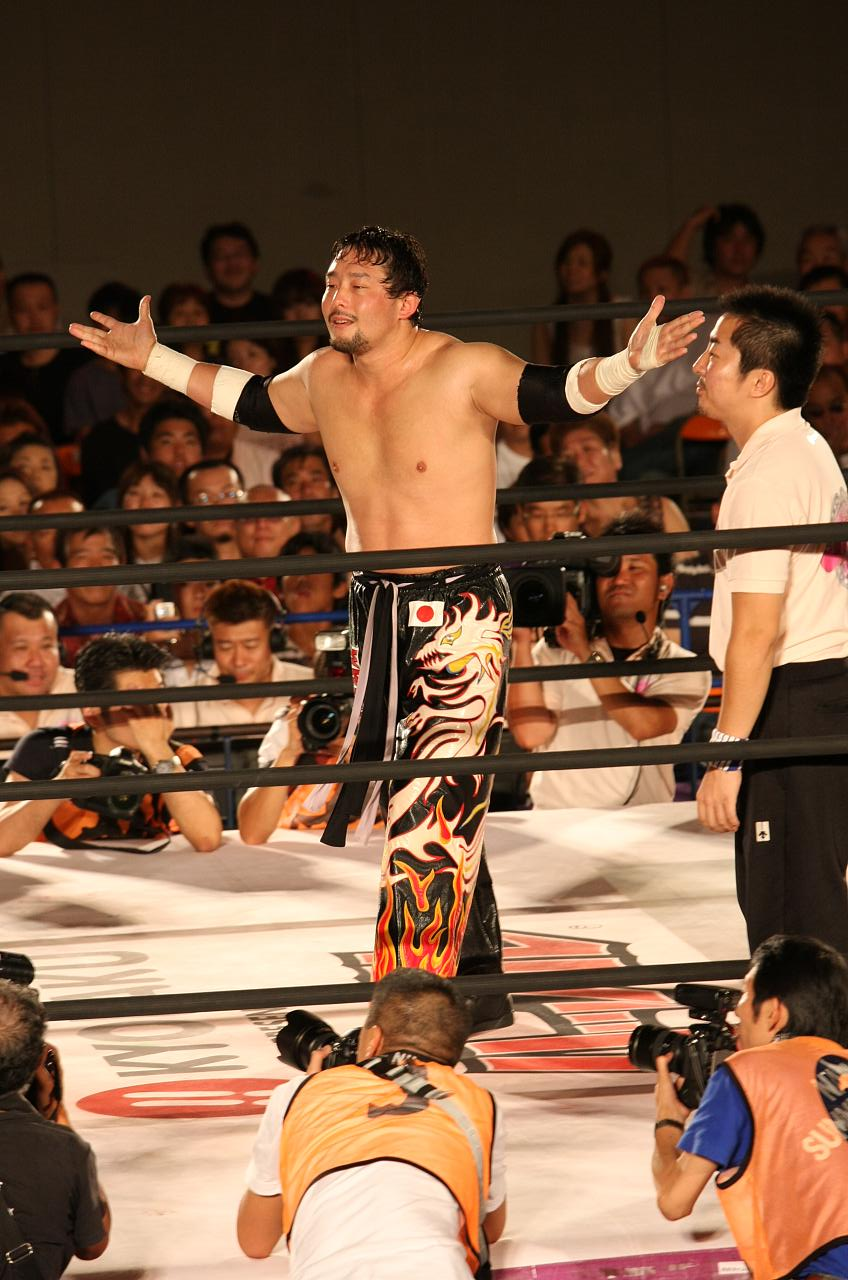 TAJIRI